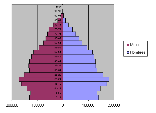 Pirámide de población de Irlanda basada en datos del año 2011